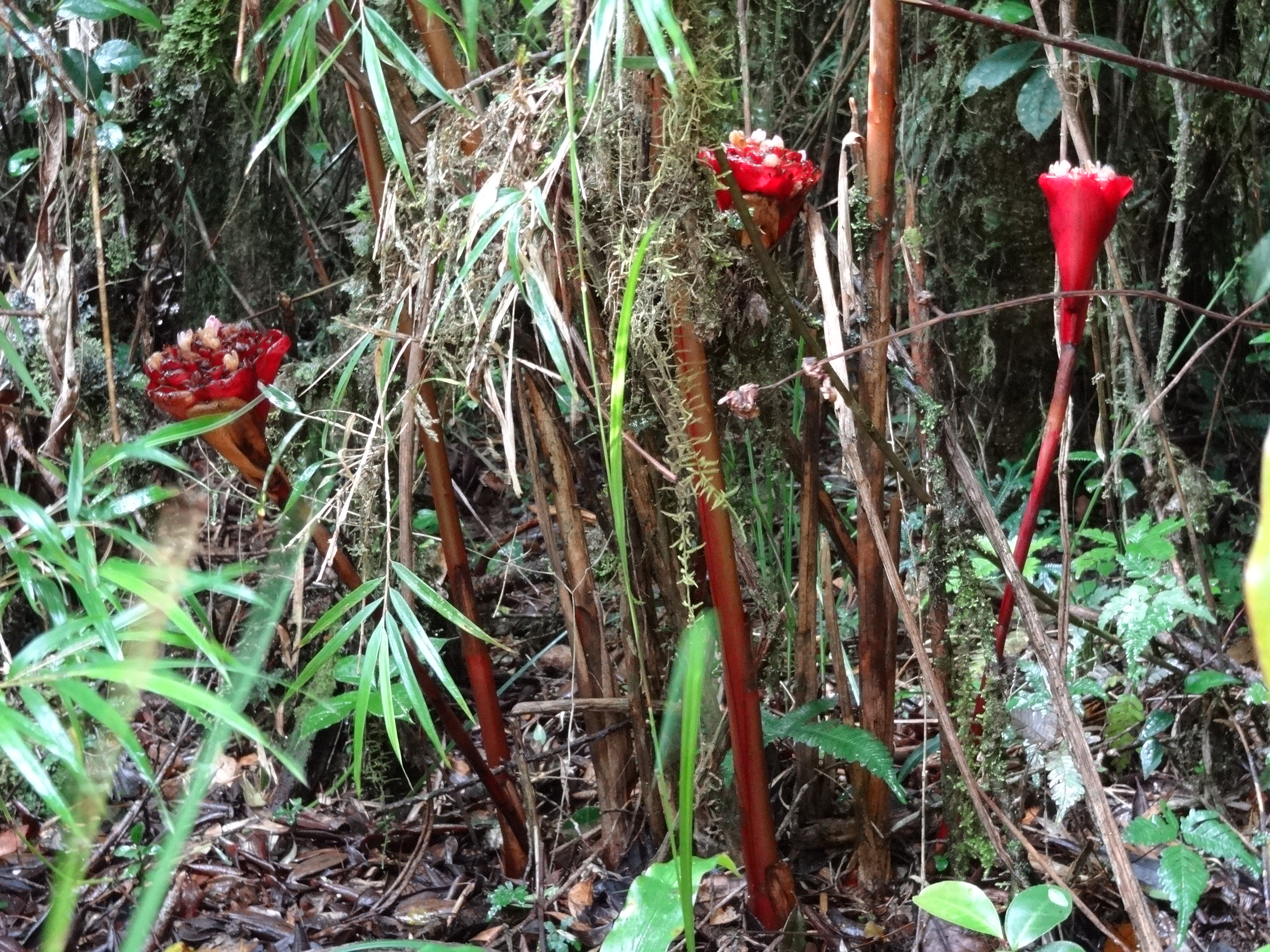 Horton Plains National Park